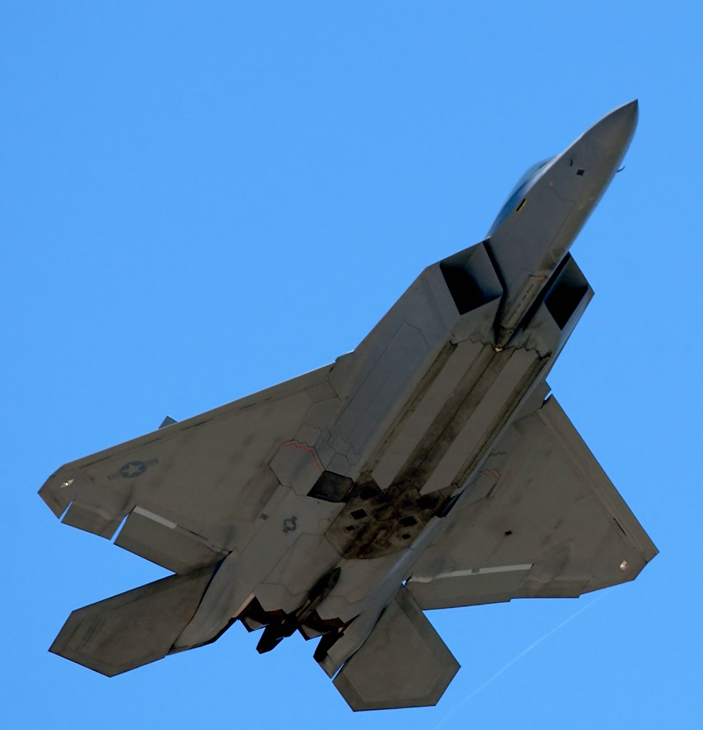 F/A-22 Raptor